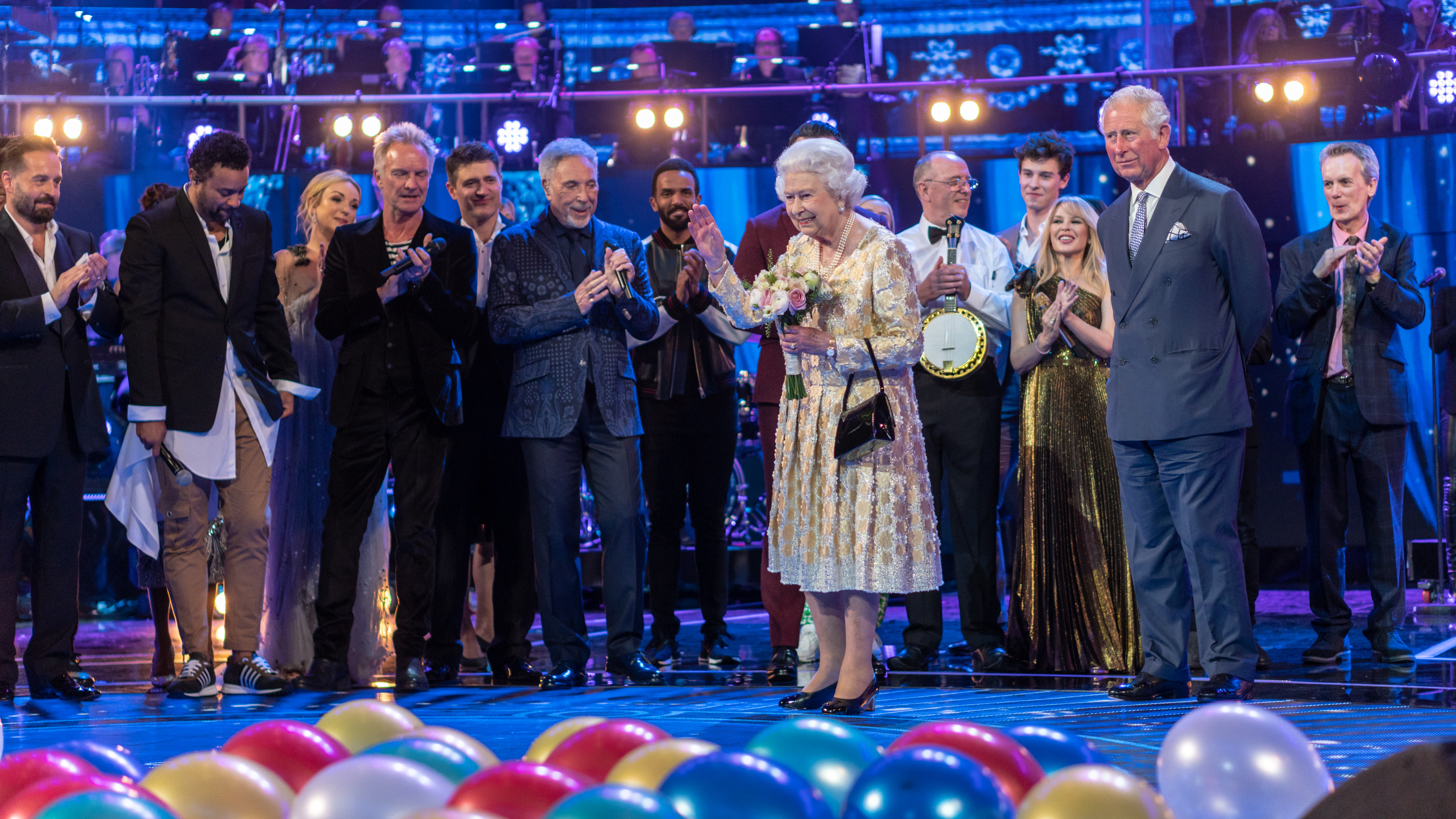 QueenbdayRAH210418-112